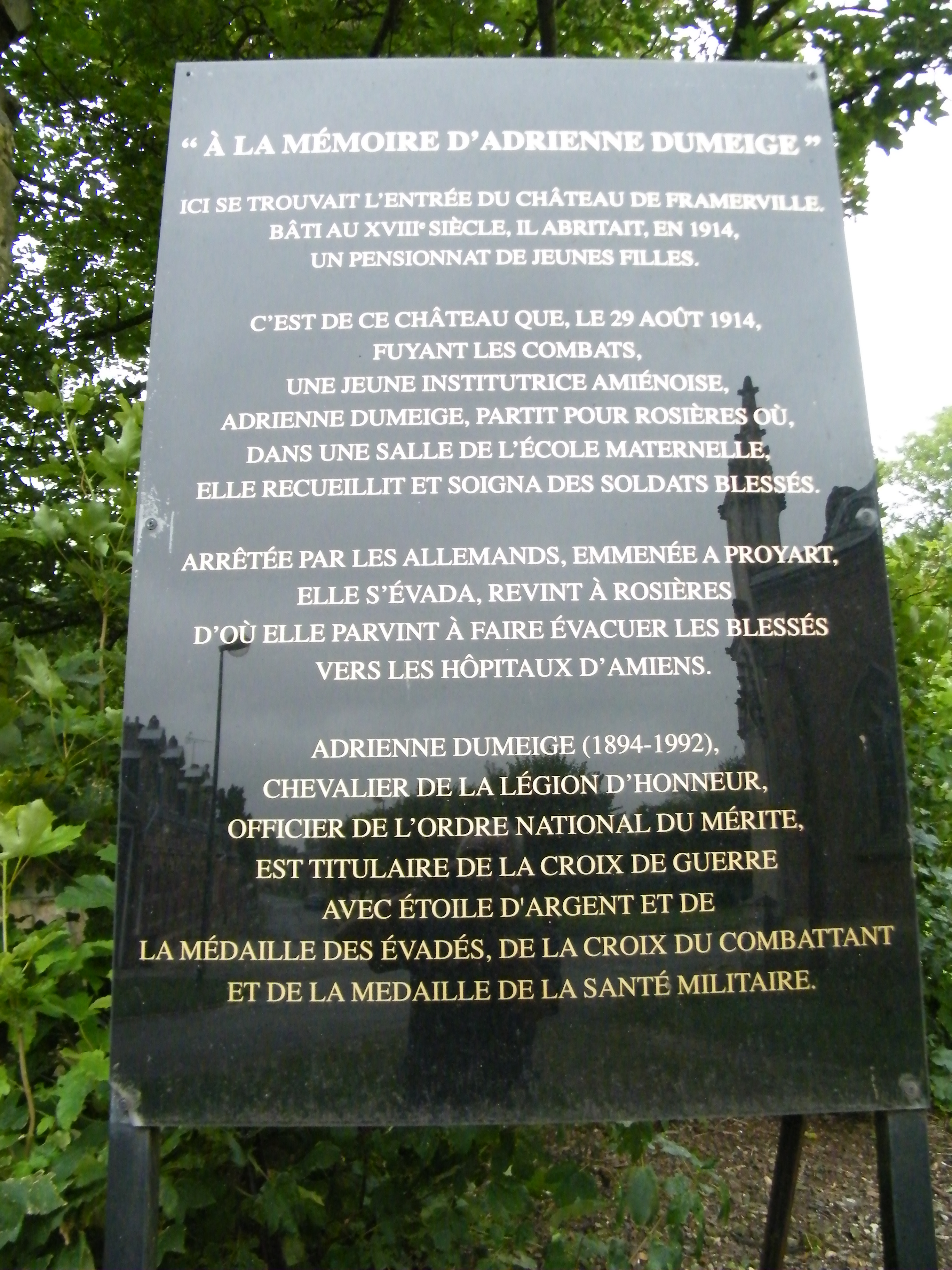 Hommage.